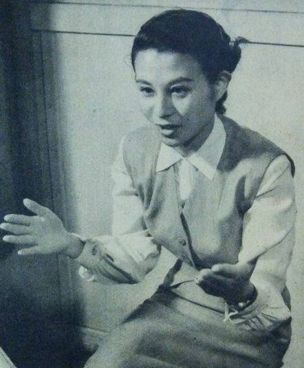 久我美子